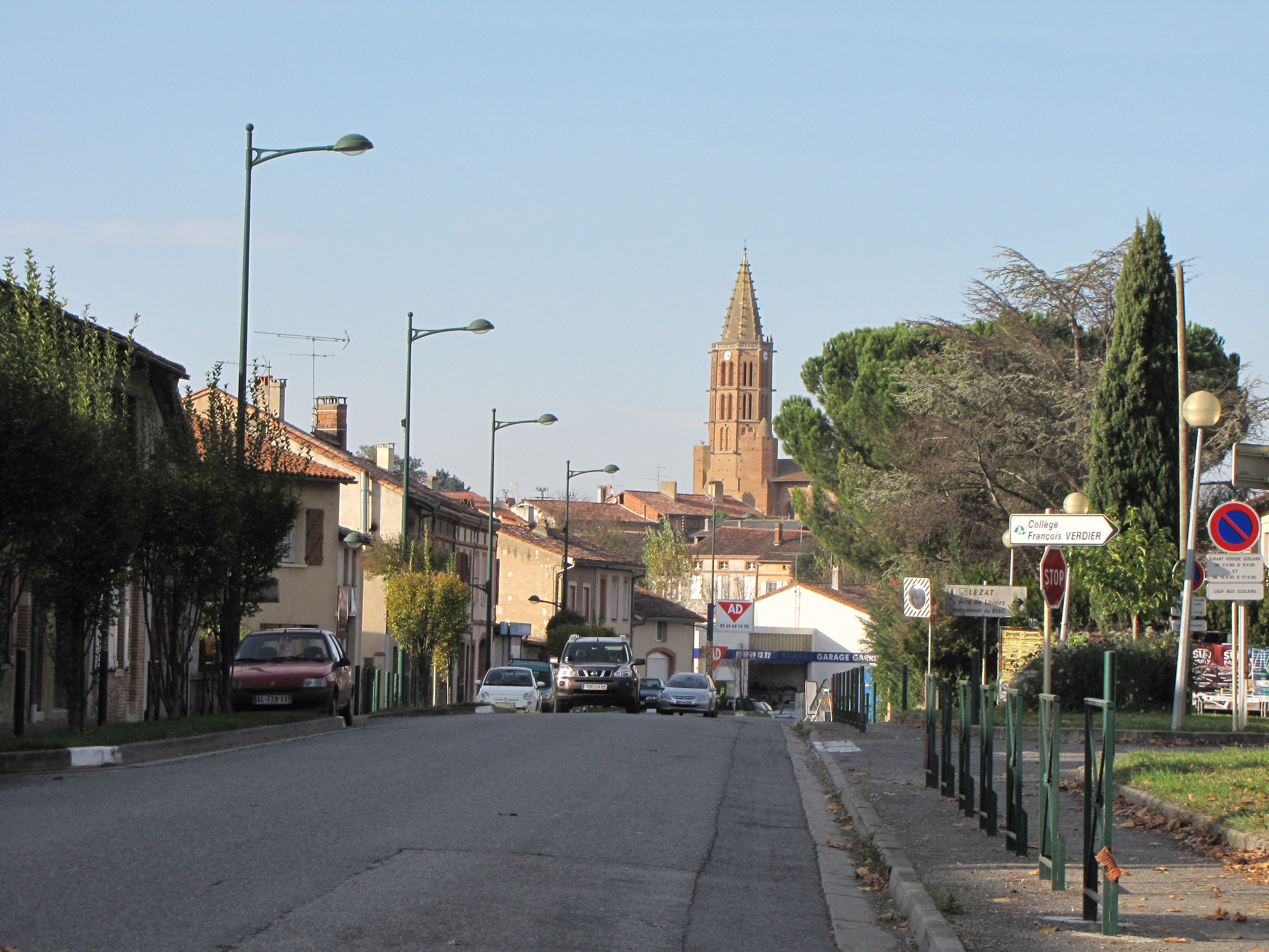 Lézat-sur-Lèze (Ariège, France)